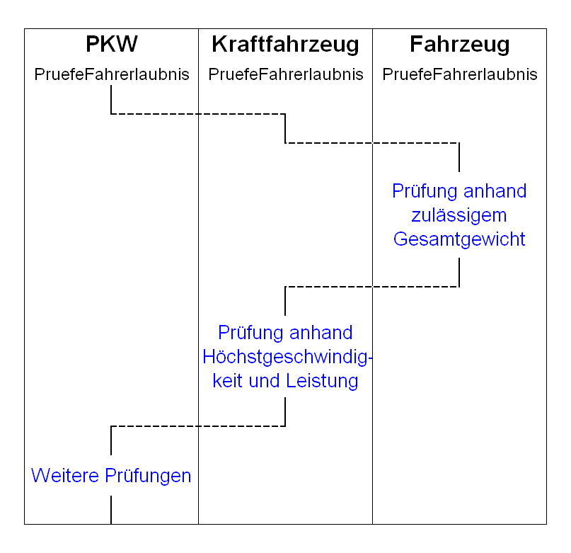 Vererbung, Aufrufkaskade für Basisimplementierungen